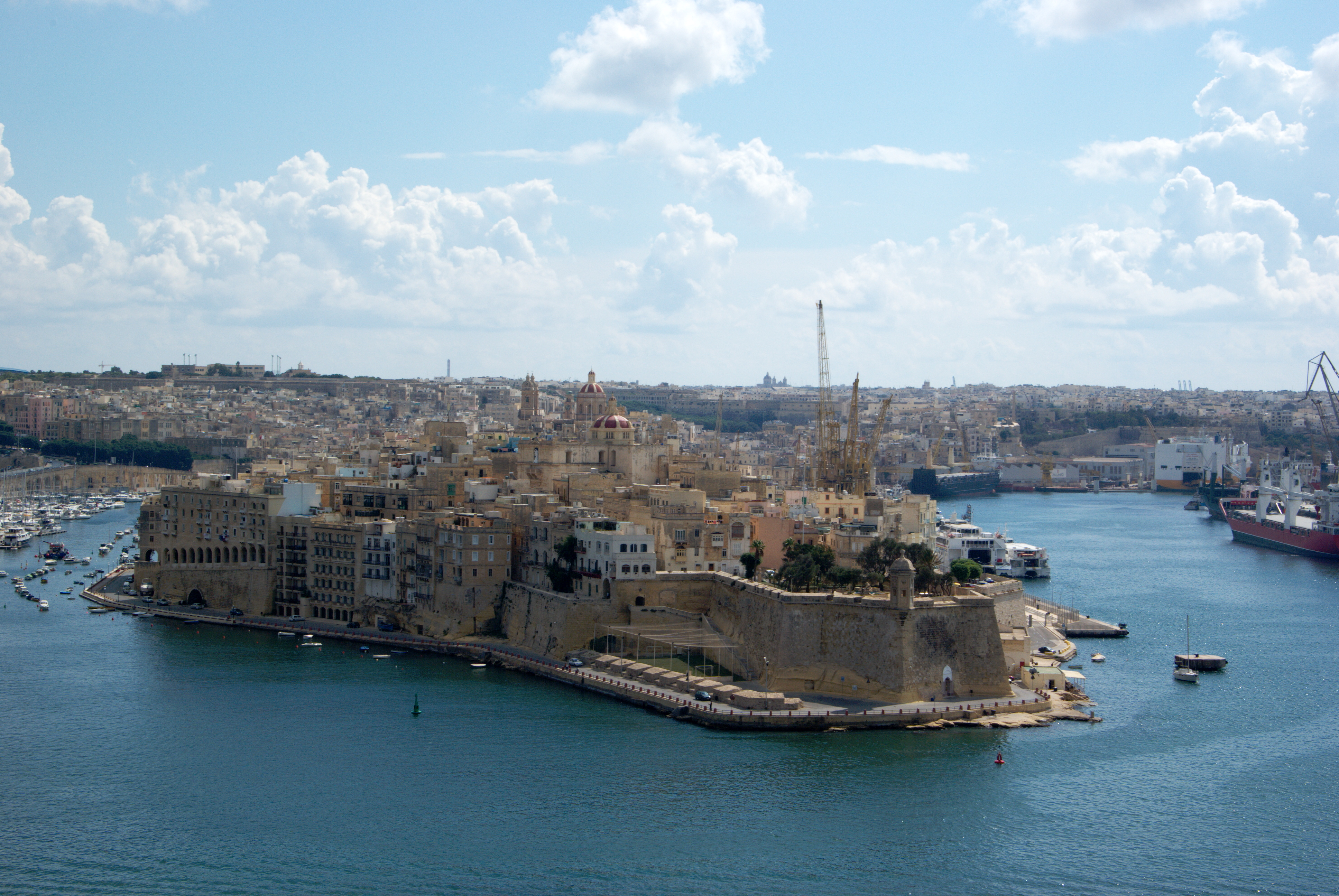 Malta, Senglea